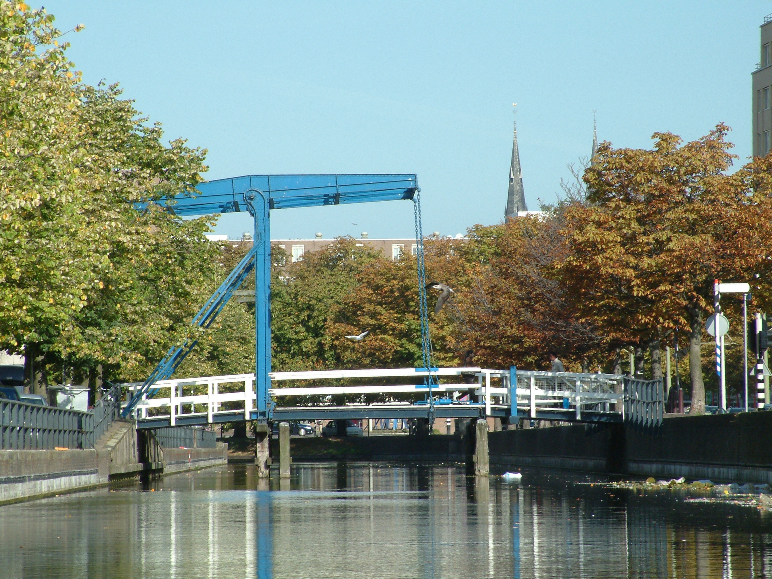 Brug in Den Haag